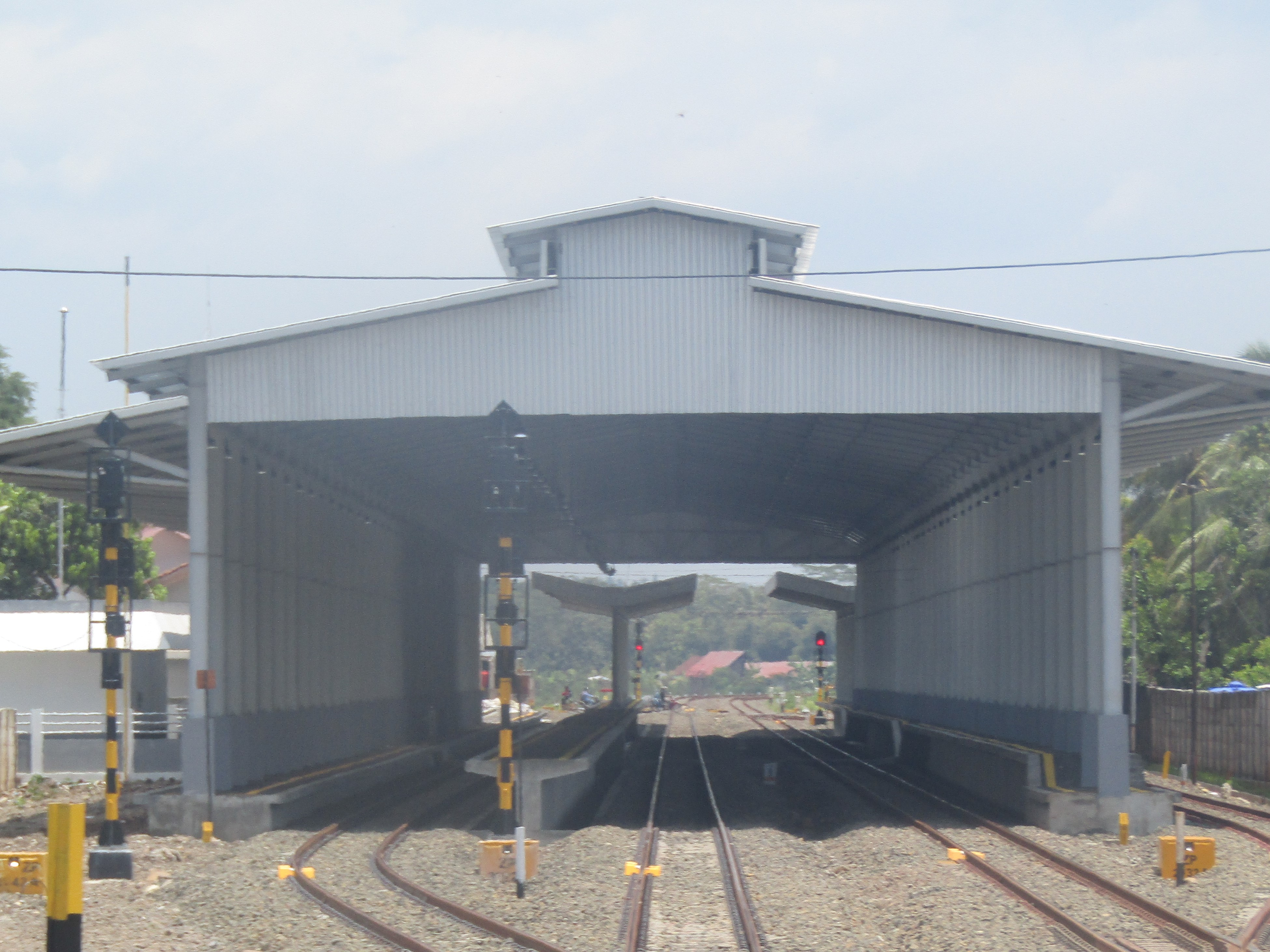 Emplasemen Stasiun Karanganyar yang sudah diperbarui atap peronnya